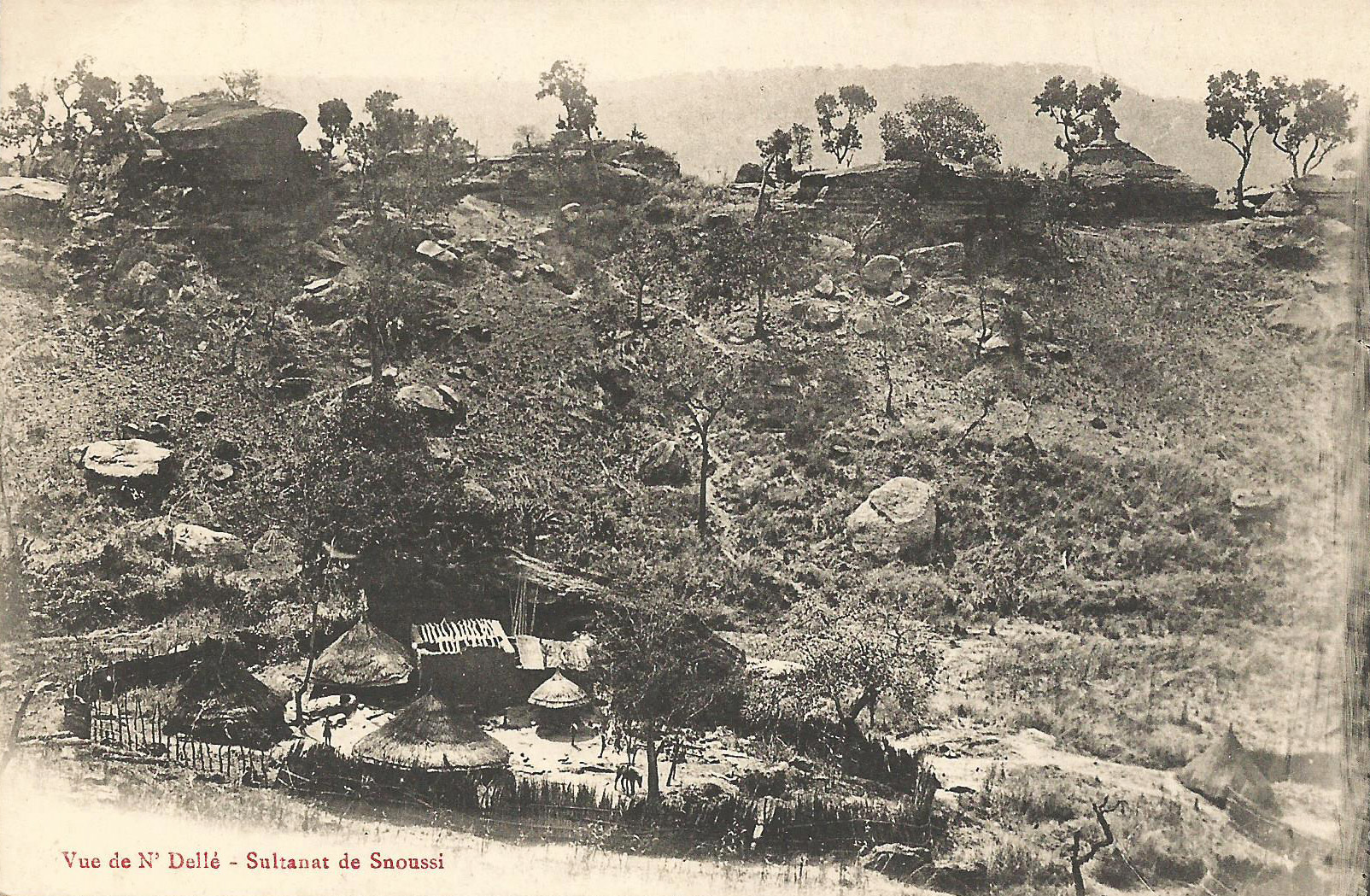 Vue de N'Dellé. Sultanat de Snoussi. Carte postale ancienne, sans indication d'auteur, d'éditeur ou de date. Collection particulière